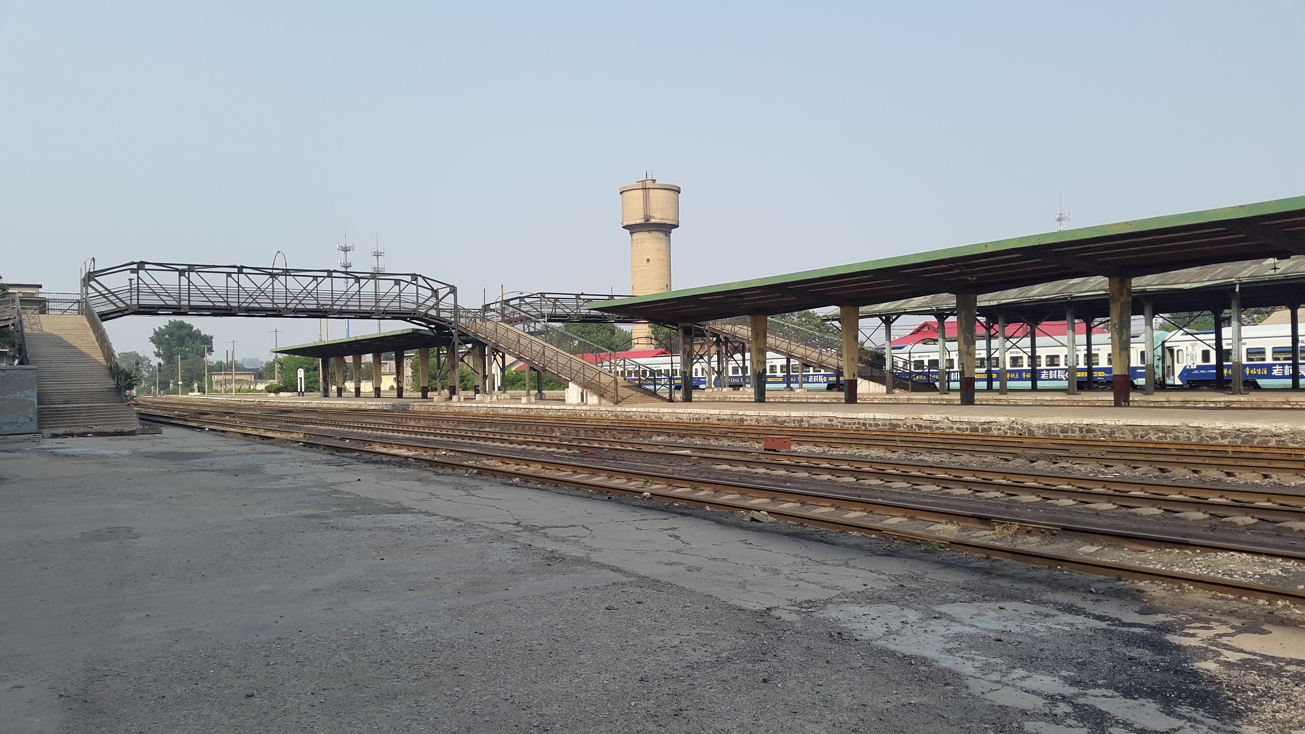 唐山南站天桥和水塔